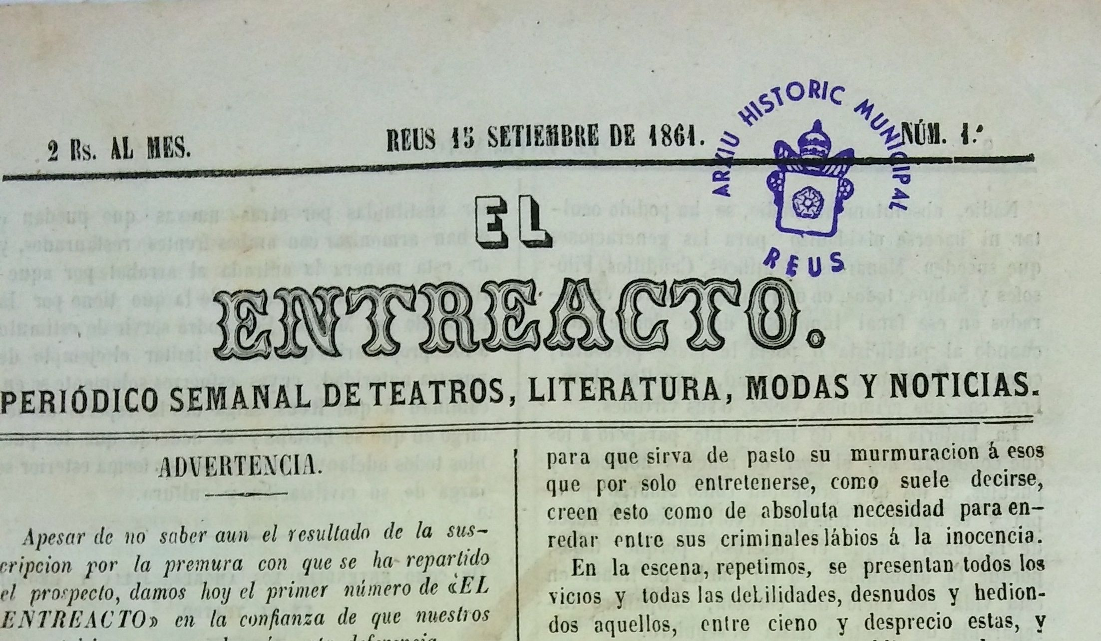 Portada del núm. 1 de El Entreacto